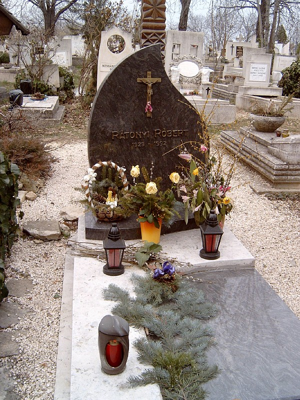 Rátonyi Róbert (Budapest, 1923. február 18. – Budapest, 1992. október 8.) magyar színész sírja Budapesten. Farkasréti temető: 25-4-18/1.